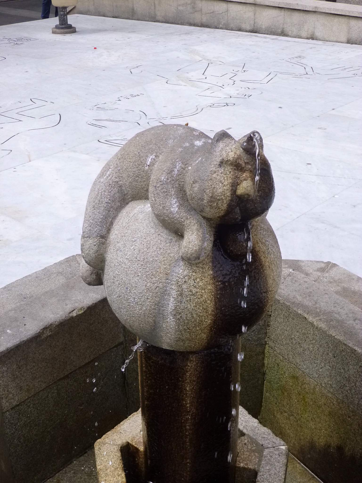 A Coruña - Praza do Humor